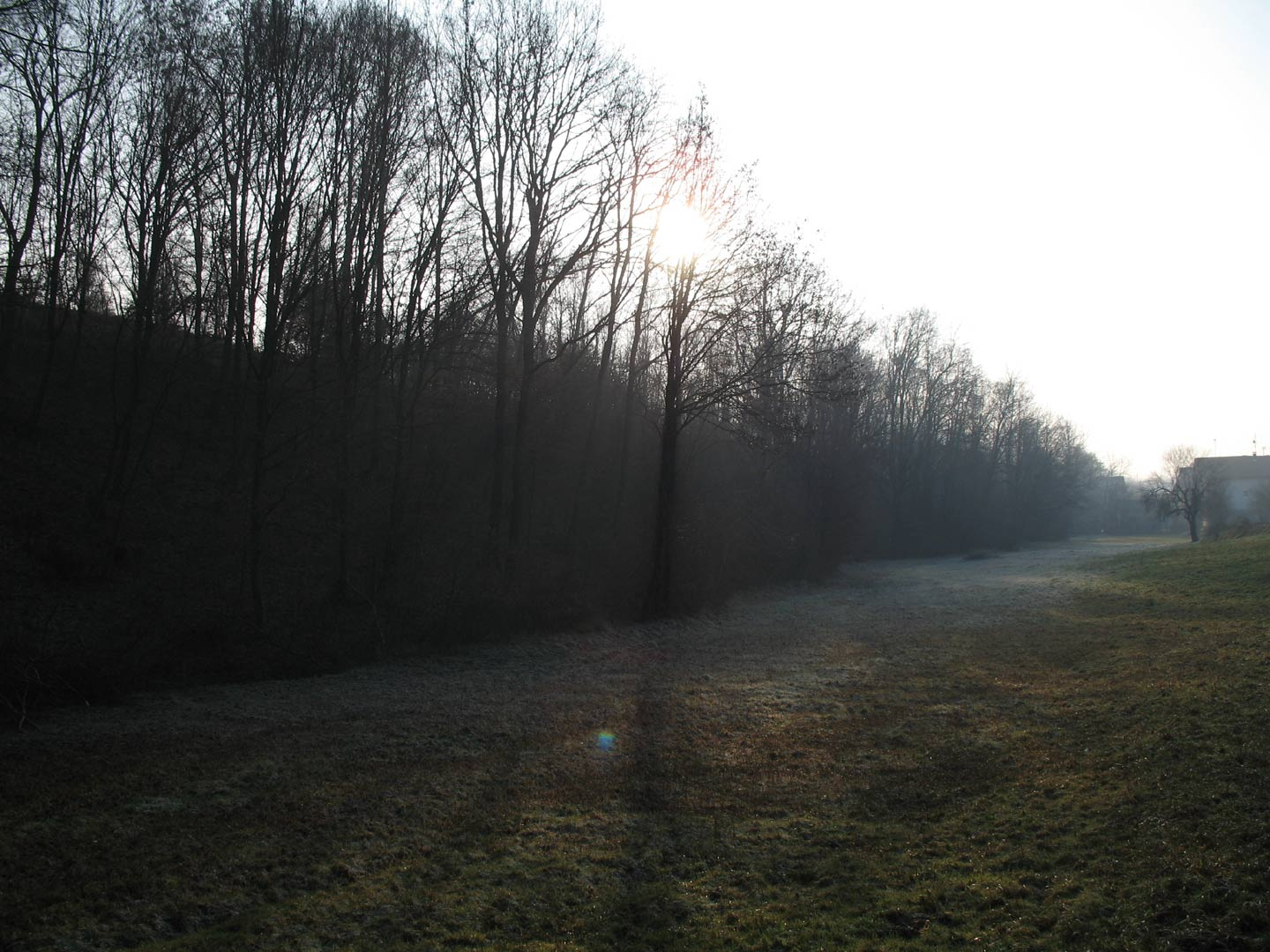 Децембарско јутро 2006 - Стублић